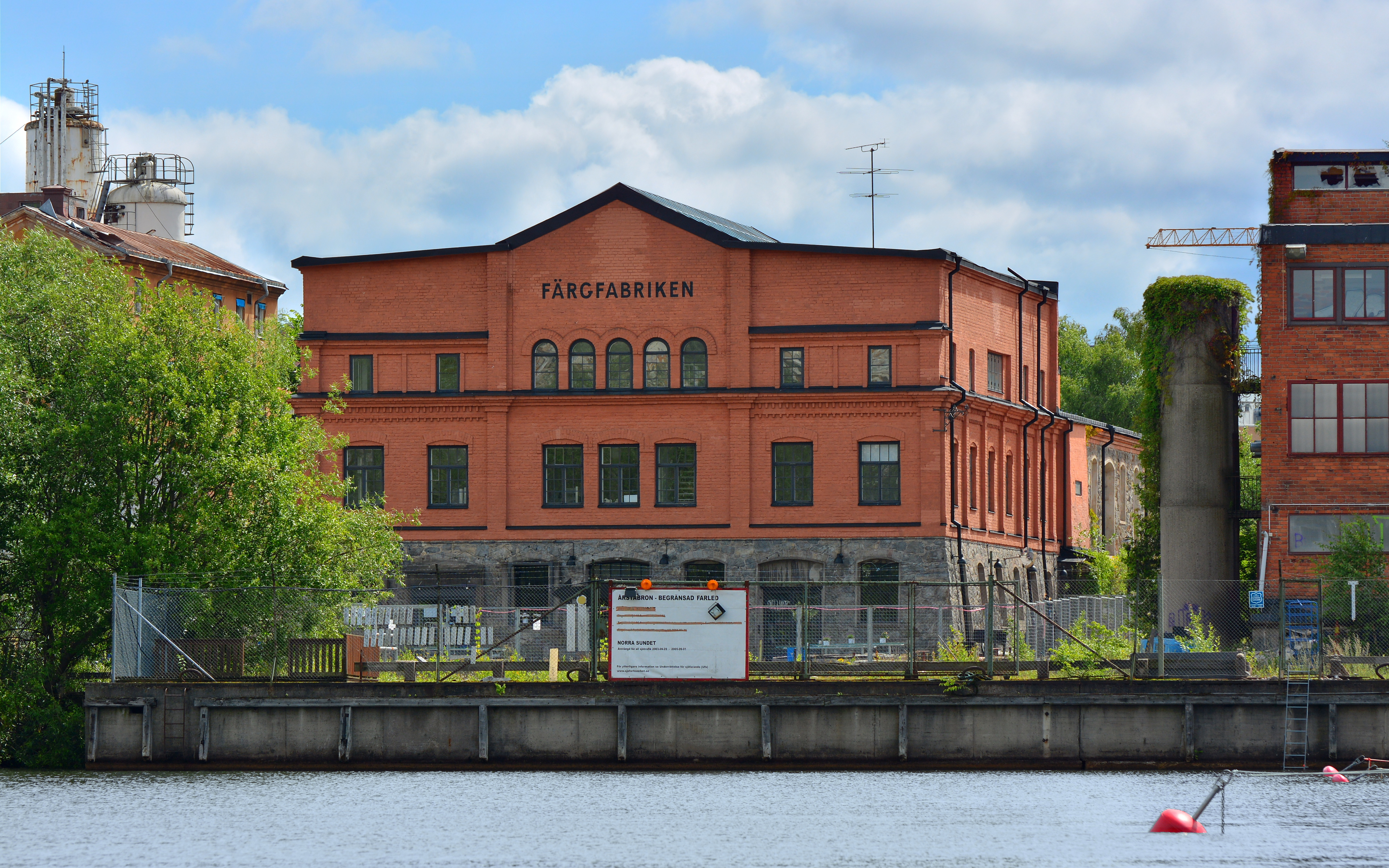 Färgfabriken i Liljeholmshamnen, Stockholm